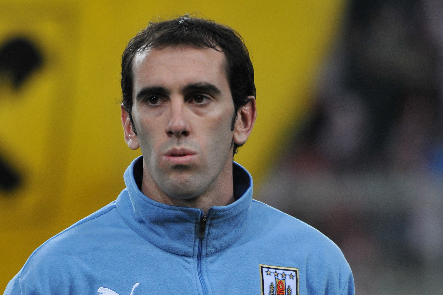 Freundschaftliches Länderspiel Österreich - Uruguay am 5. März 2014 in Klagenfurt: Diego Godín.